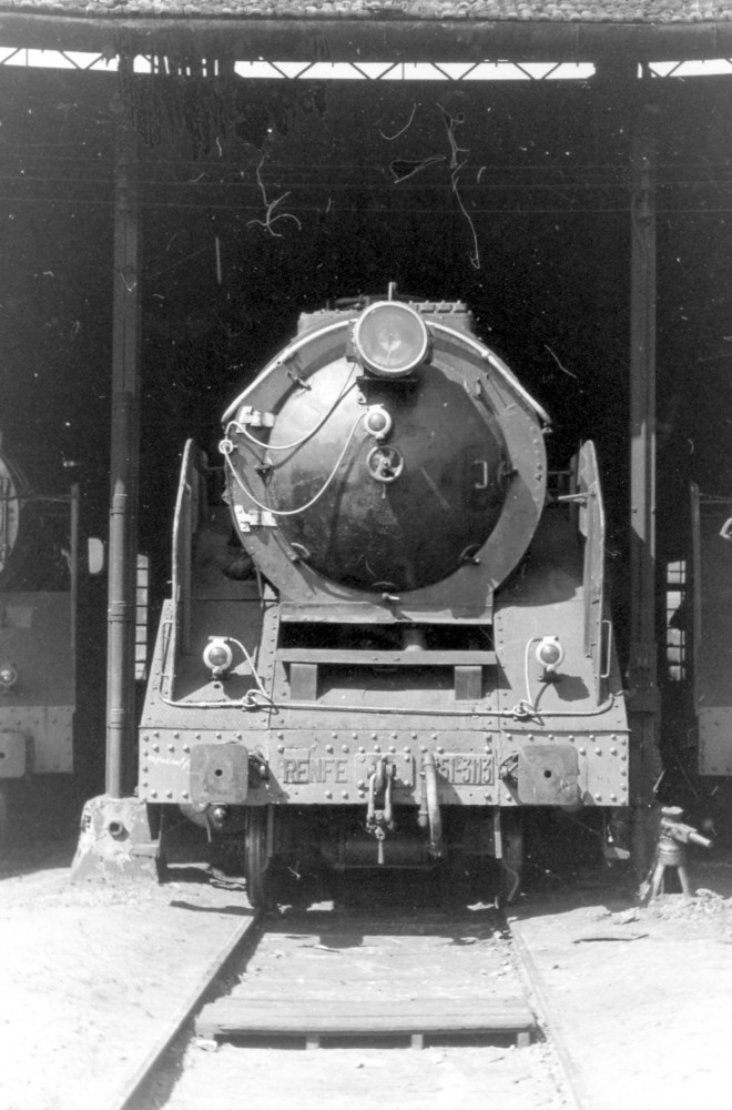 La Renfe 151-3113 en Zaragoza.